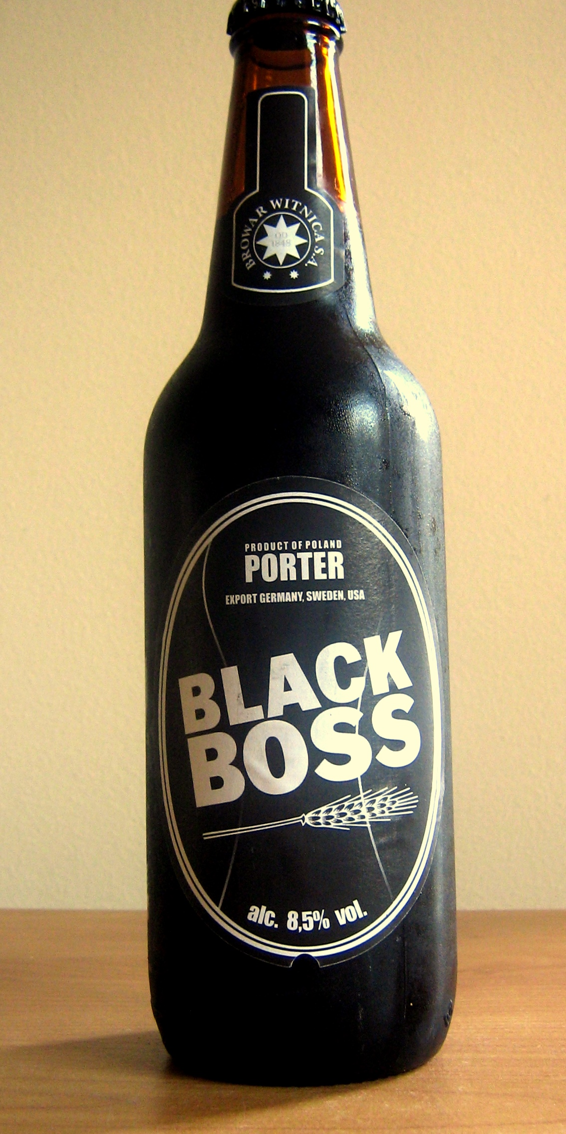 Black Boss Porter z Browaru Witnica, 2010 r.